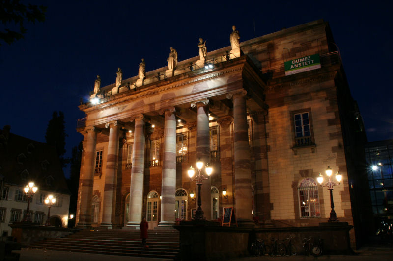 L'Opéra du Rhin à Strasbourg